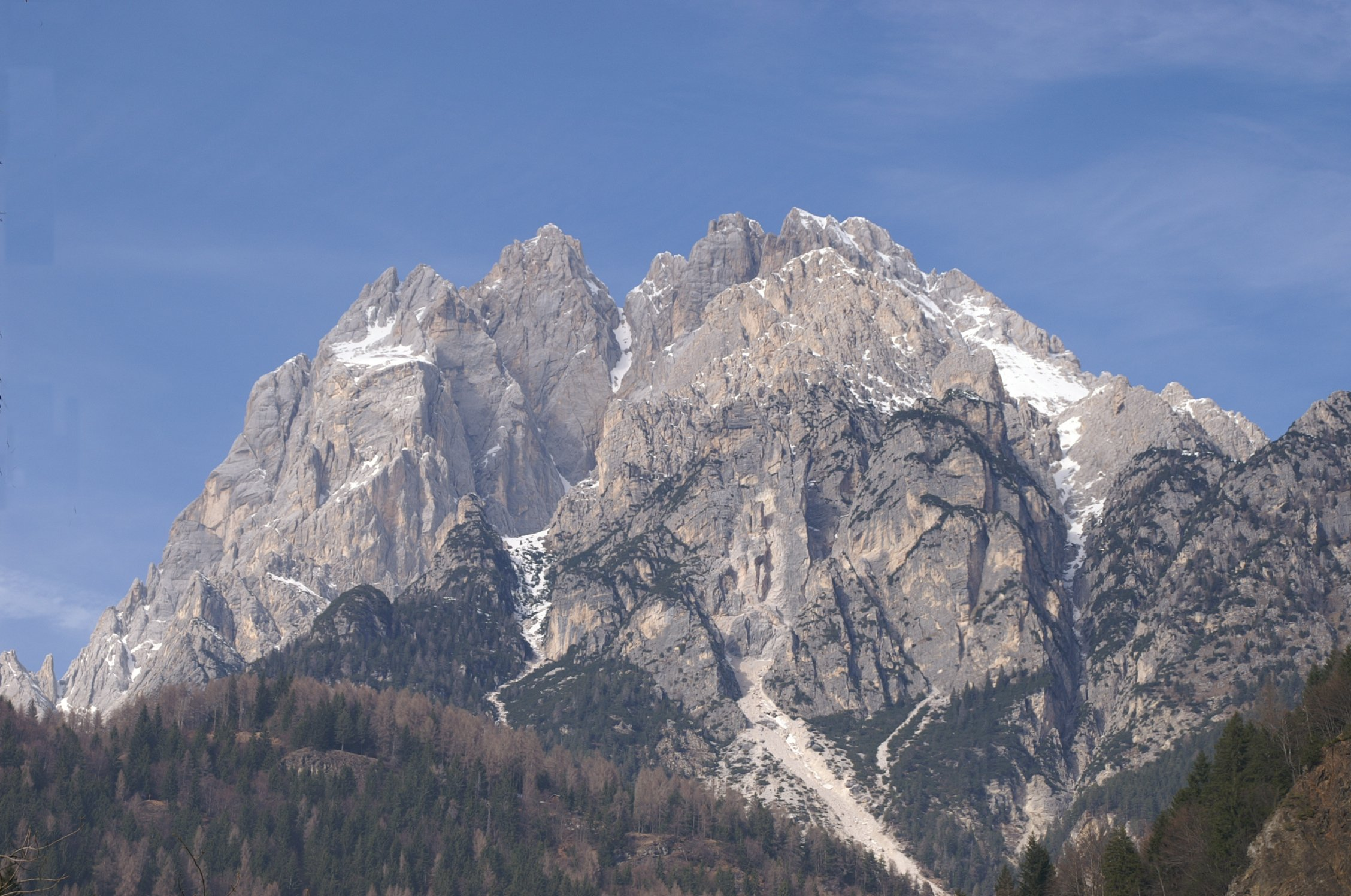 L'Antelao, il Re delle Dolomiti